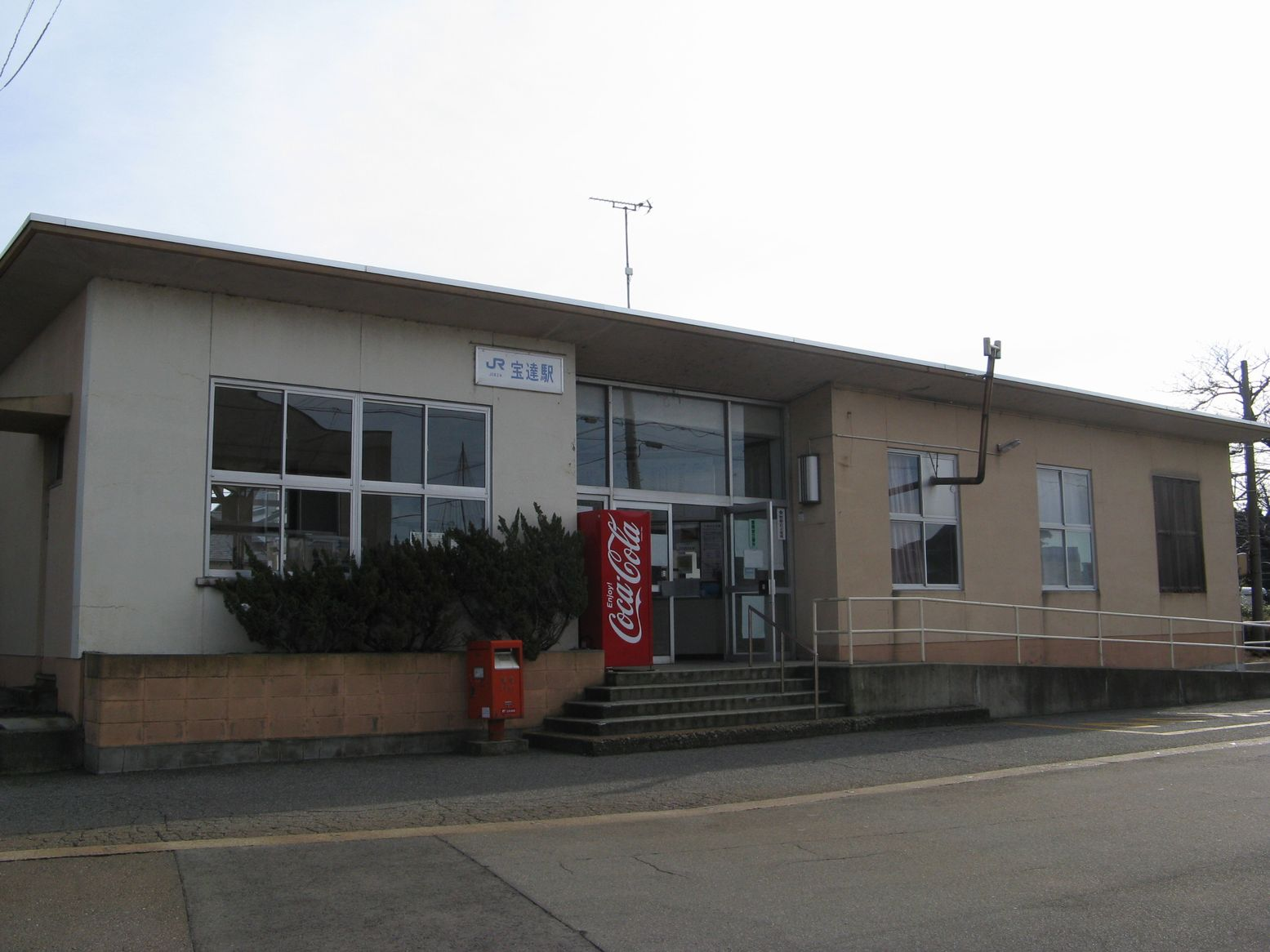 七尾線宝達駅 駅舎